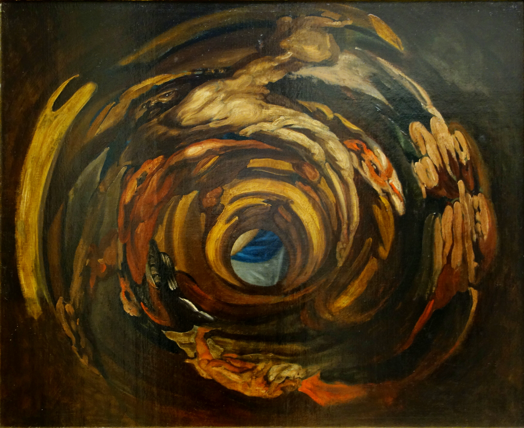 Anamorphose d'après l'Erection de la Croix de Rubens au musée des beaux-arts de Rouen.